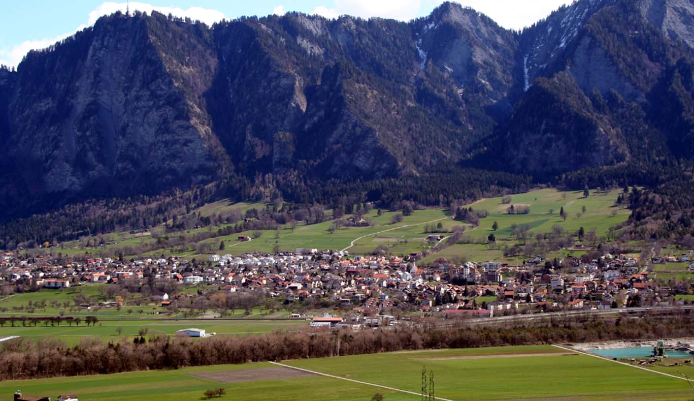 Zizers